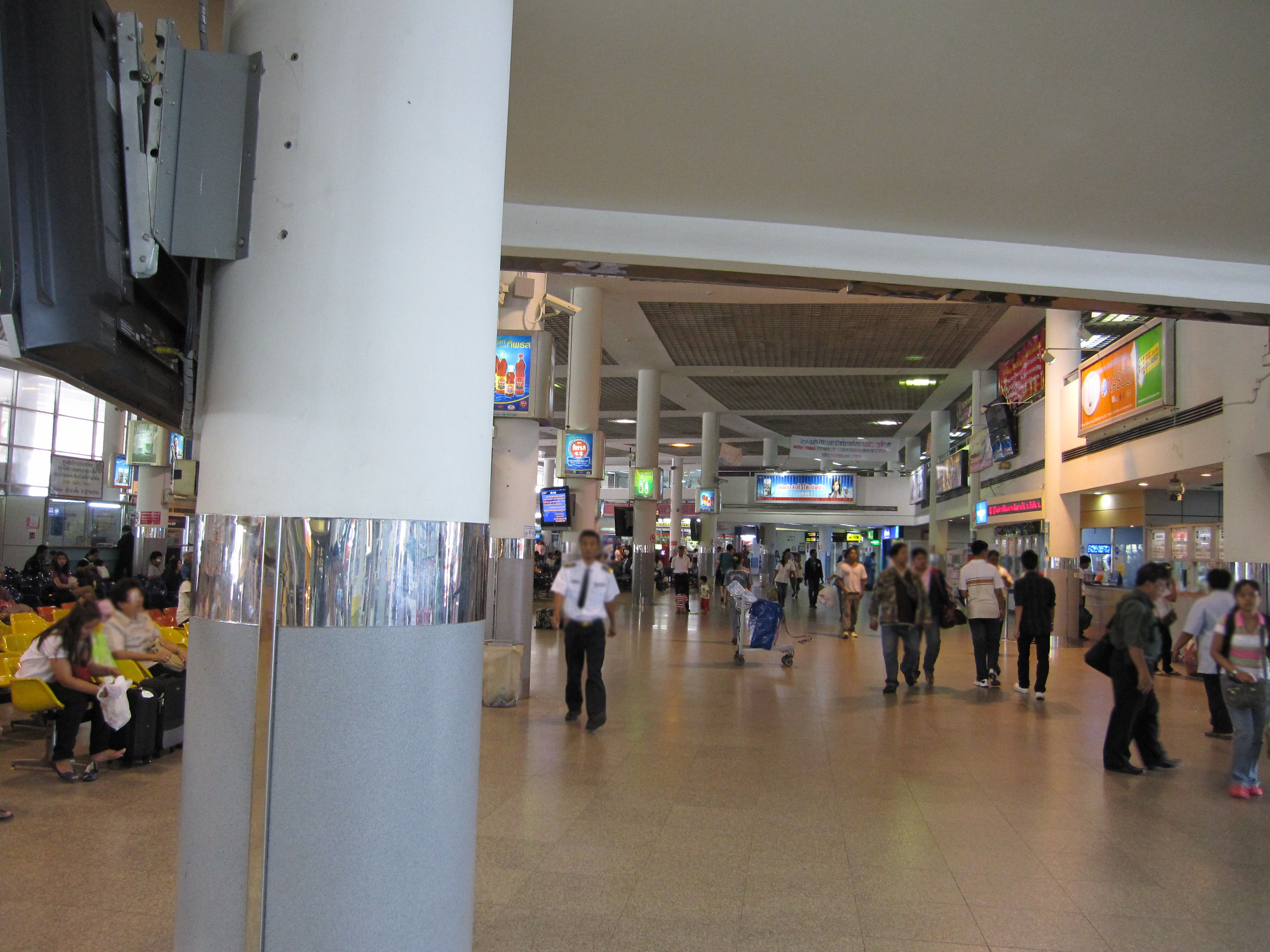 North Bus Station